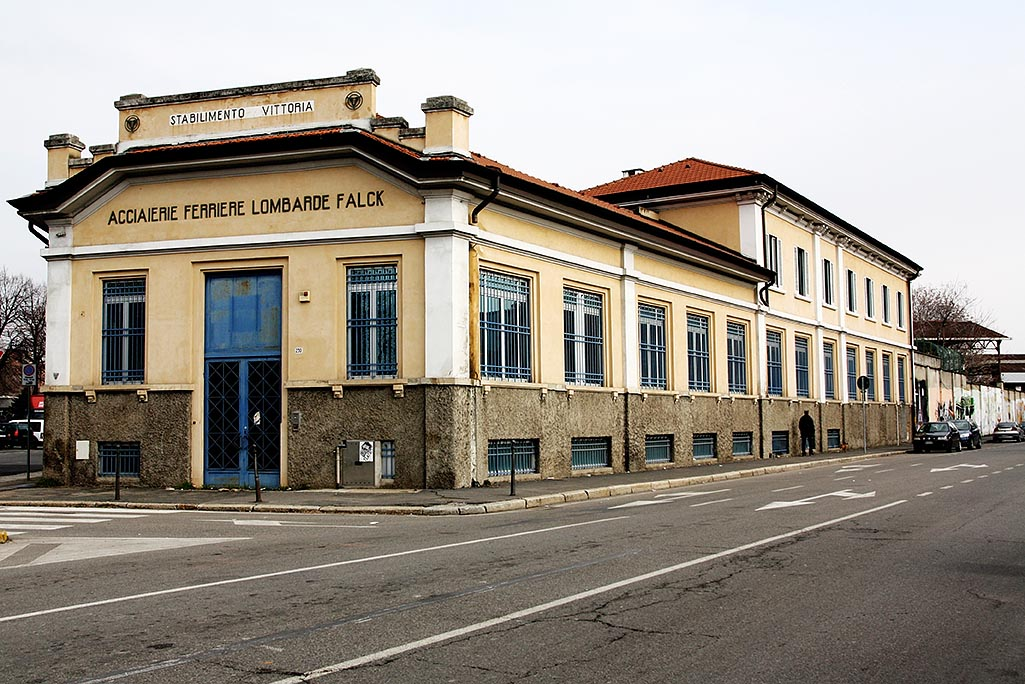 Comparto Concordia area ex-Falck This is a photo of a monument which is part of cultural heritage of Italy.